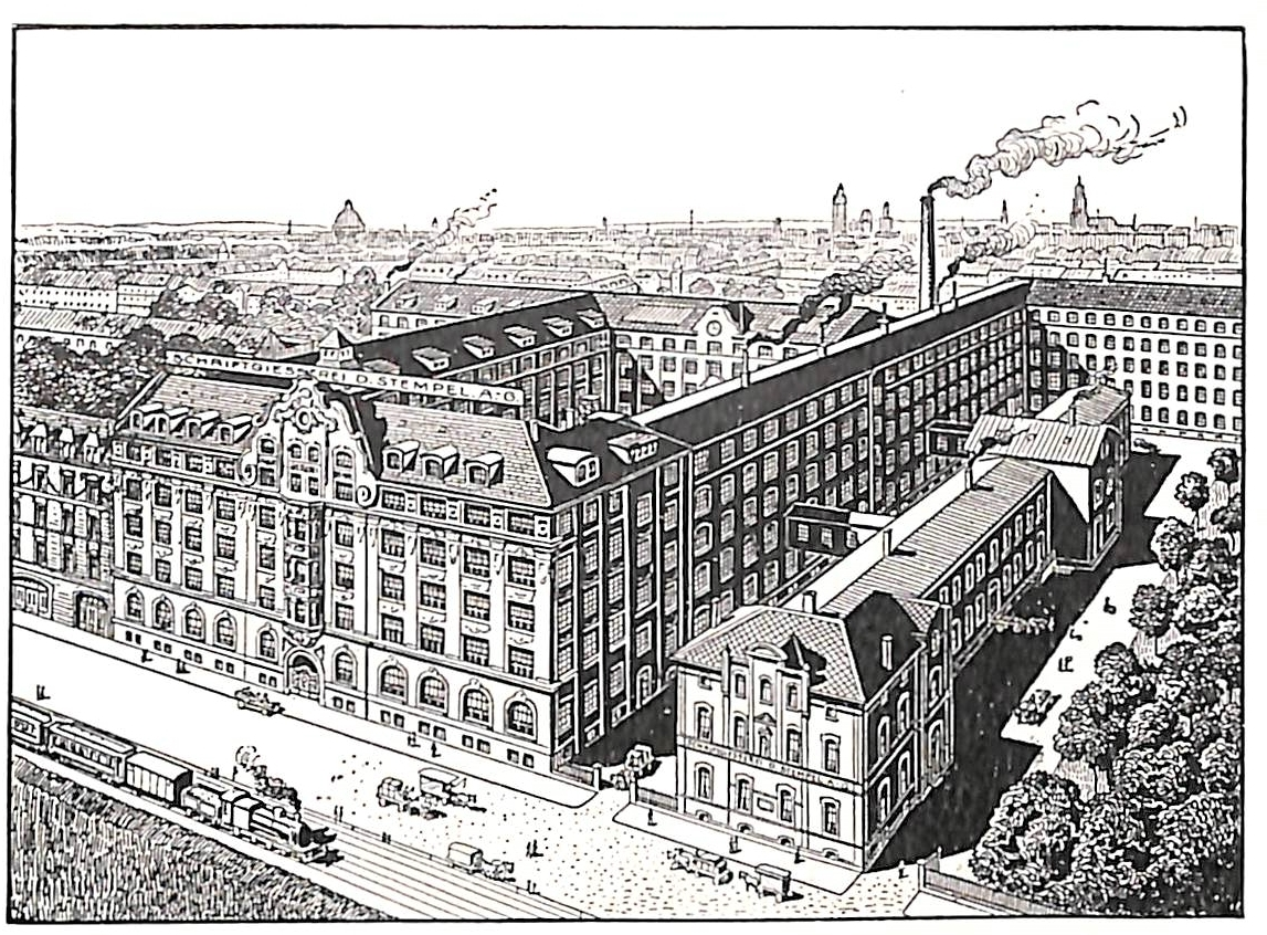 Frankfurt/Main (fiktive) Ansicht der 1895 gegründeten Schriftgießerei von D. Stempel, einem der größten Hersteller für Linotype-Matritzen.